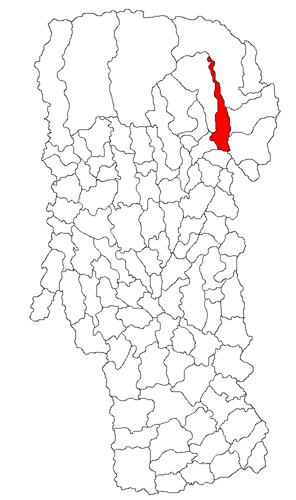 Categorie:Hărţi ale judeţului Argeş